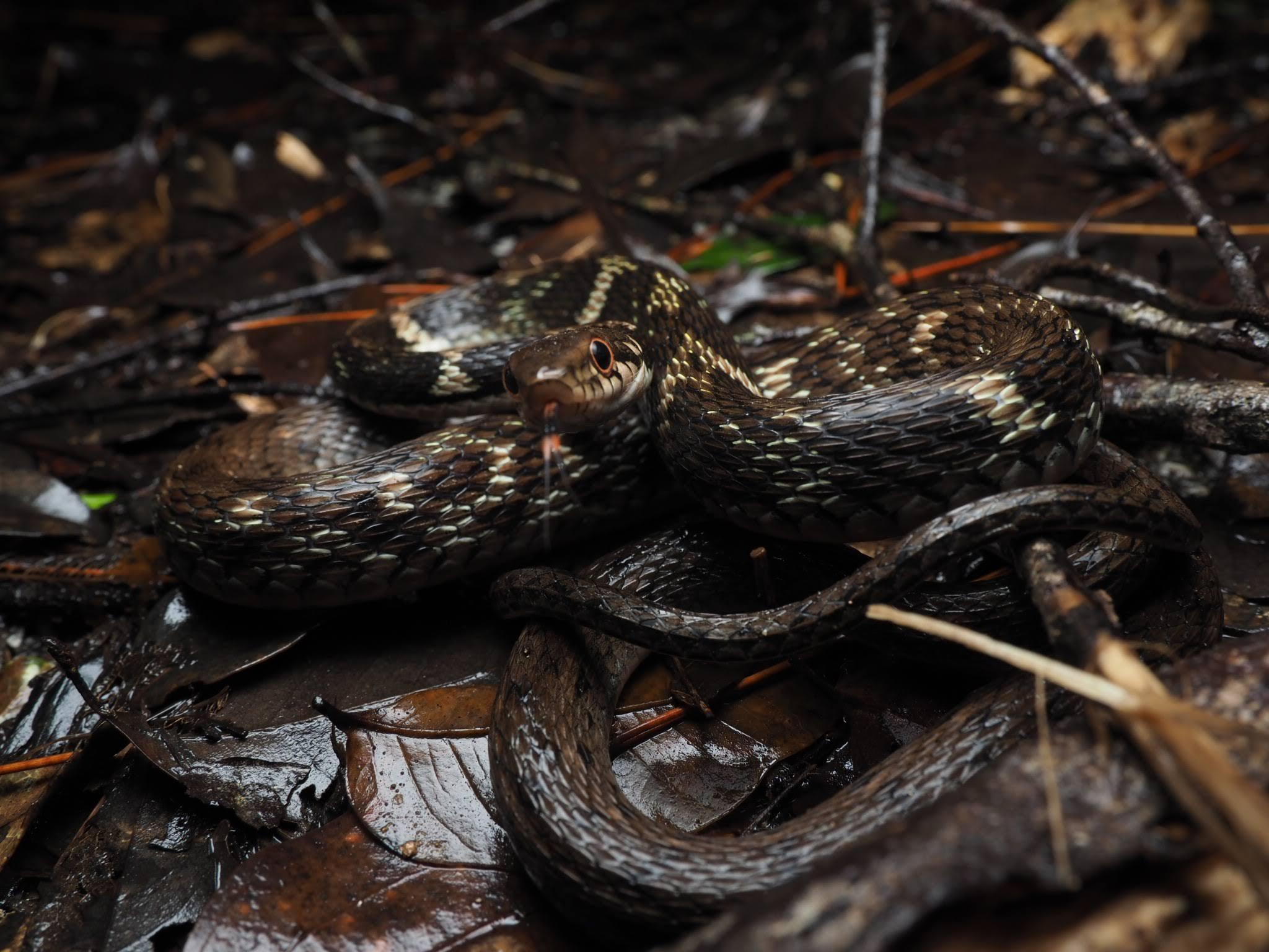 Amphiesma pryeri ガラスヒバァを沖縄県のやんばるの沢が近くにある林床にて撮影。2019年8月11日